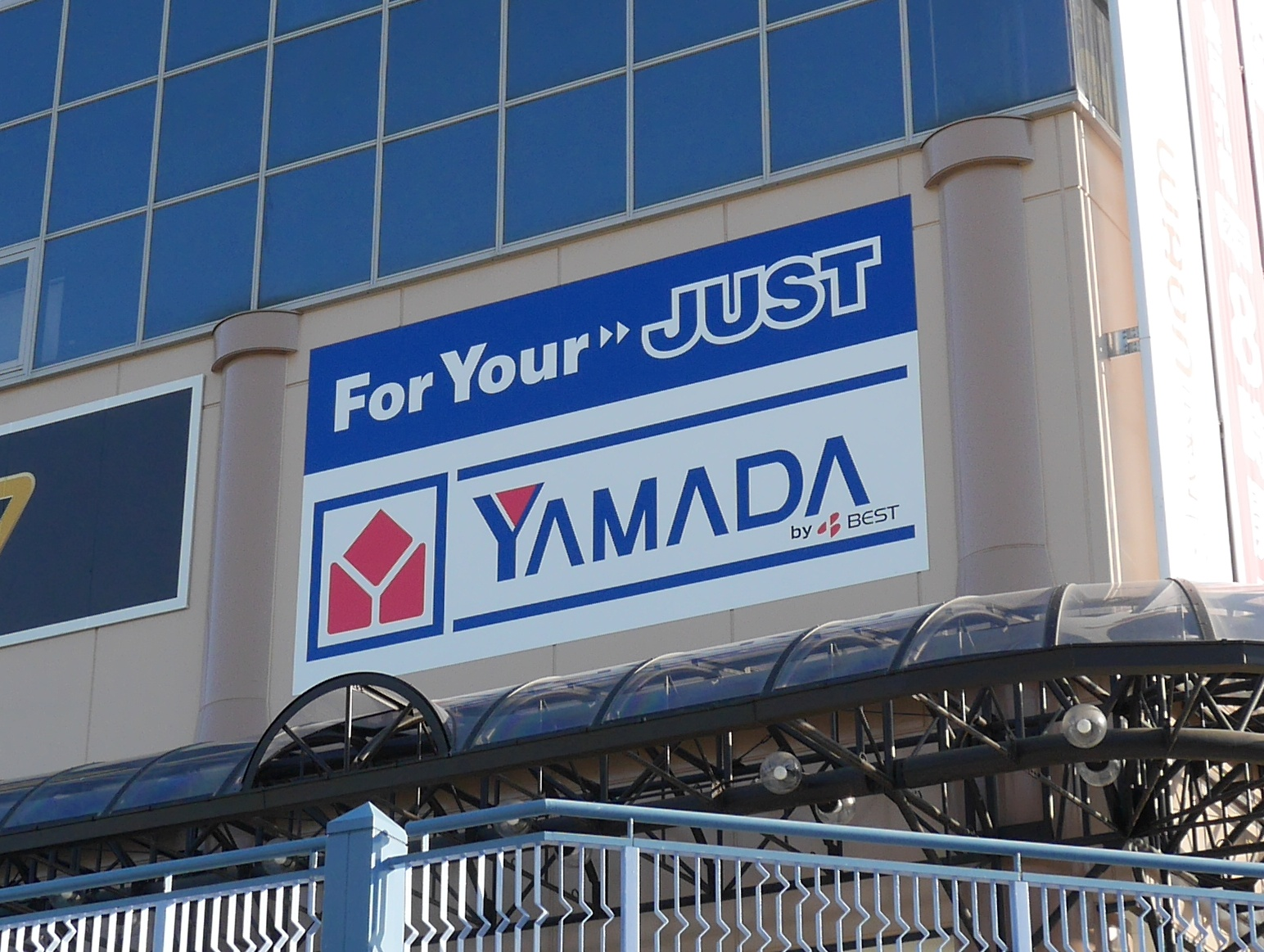 イオン新浦安店に掲げられているヤマダ電機テックランドイオン新浦安店の看板。同店はベスト電器が運営しており、ヤマダ電機のロゴの下に「ByBEST」のロゴが入っている。